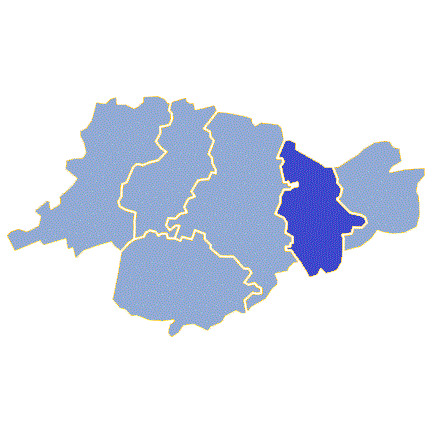 Powiat świebodziński - Gmina Szczaniec